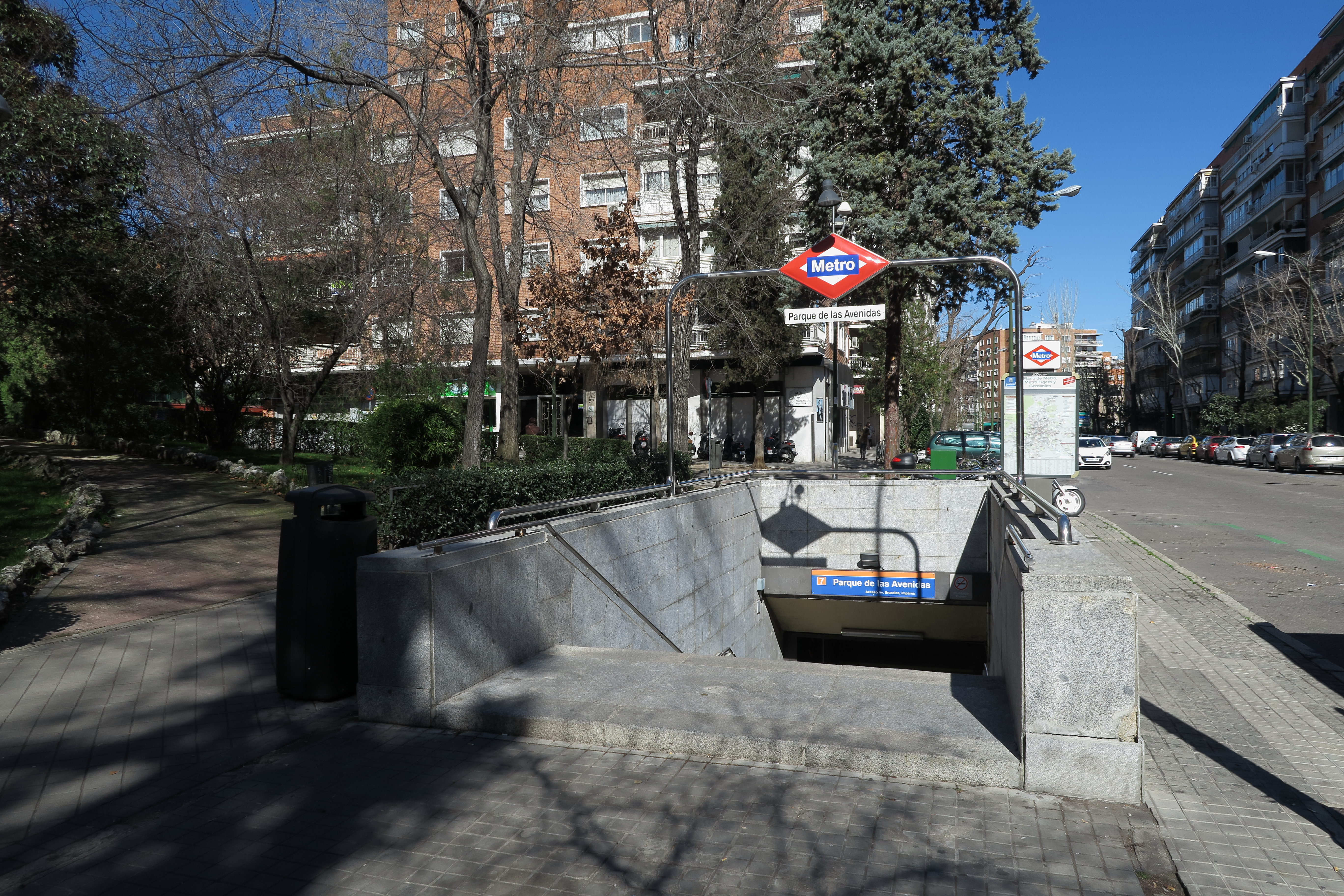 Estación de Parque de las Avenidas